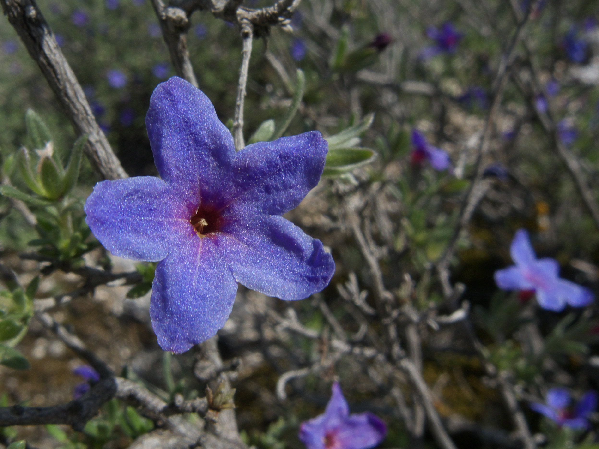 Flor (Rivas Vaciamadrid, Madrid)